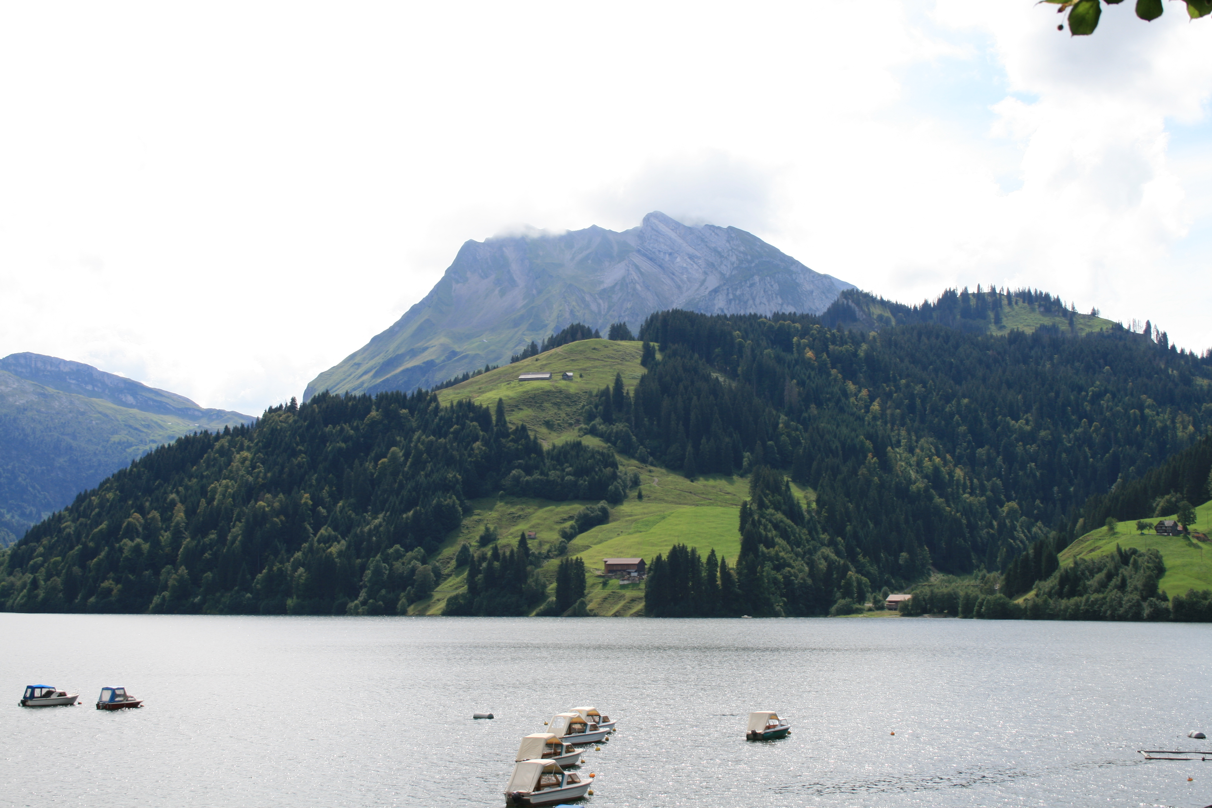 Wägitalersee (Lake Wägitaler) in Innerthal SZ Switzerland